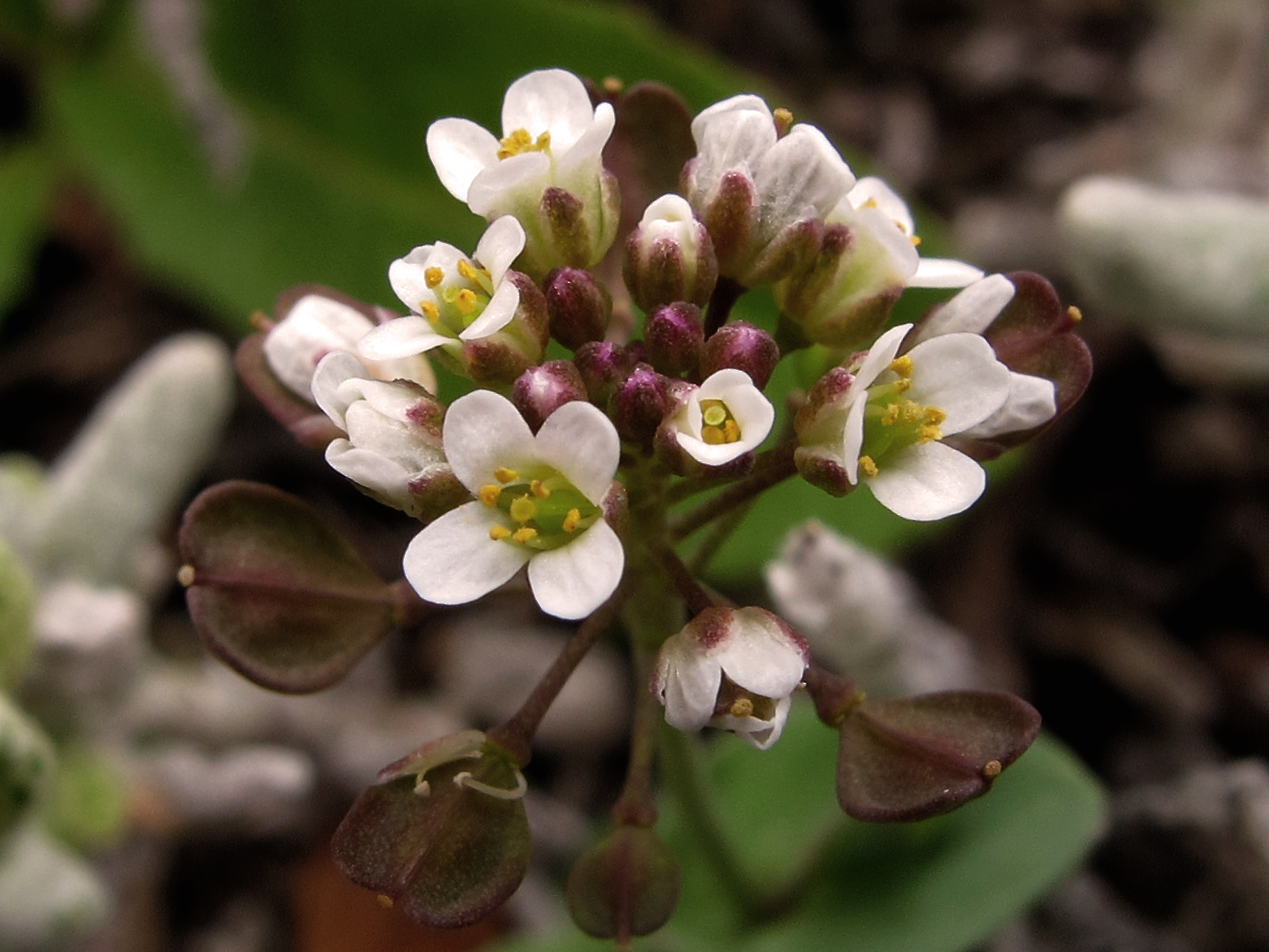 Es inconfundible, al ver sus frutos .La bolsa de pastor, es una planta a la que se le dan créditos de ser carnívora. Es considerada una planta protocarnívora única, ya que sólo puede capturar a sus presas durante un perdíodo de su ciclo de vida. Las semillas de la planta, al humedecerse, secretan un líquido viscoso que atrae activamente y mata a sus presas.